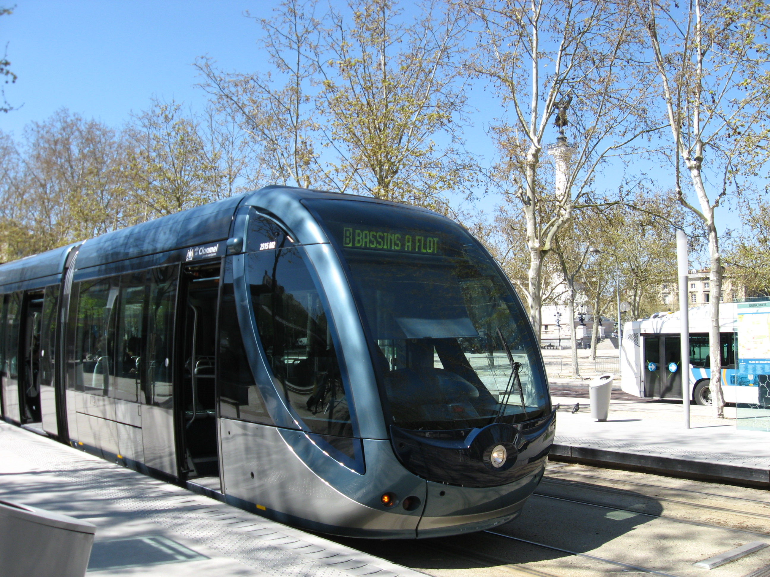 Tram in bordeaux bij de halte Quinconces